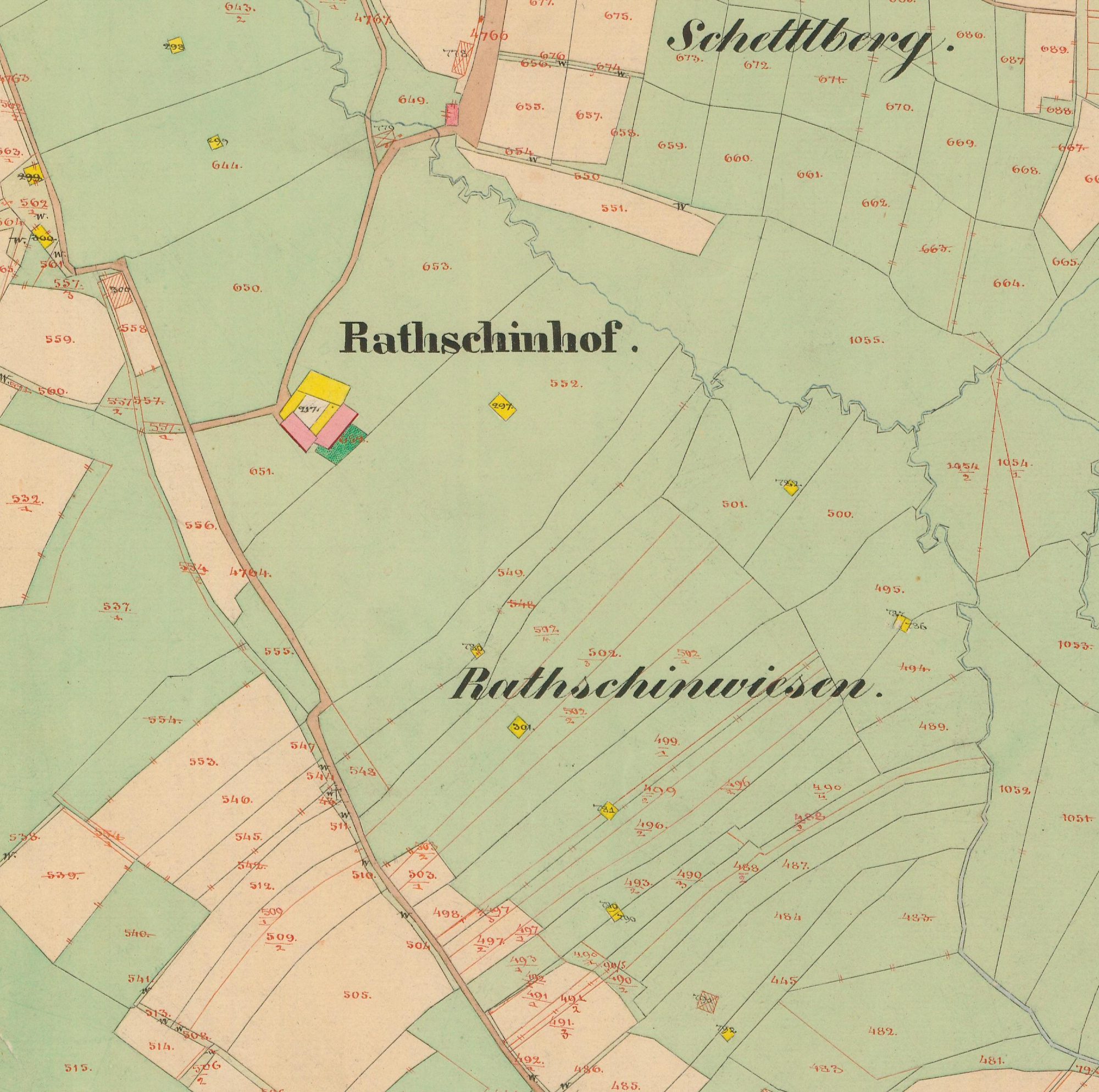 Volarské seníky v okolí samoty Rathschinhof severozápadně od Volar. Stav v roce 1837, Císařské otisky mapy Stabilního katastru, výřez mapového listu 8752-1-020.